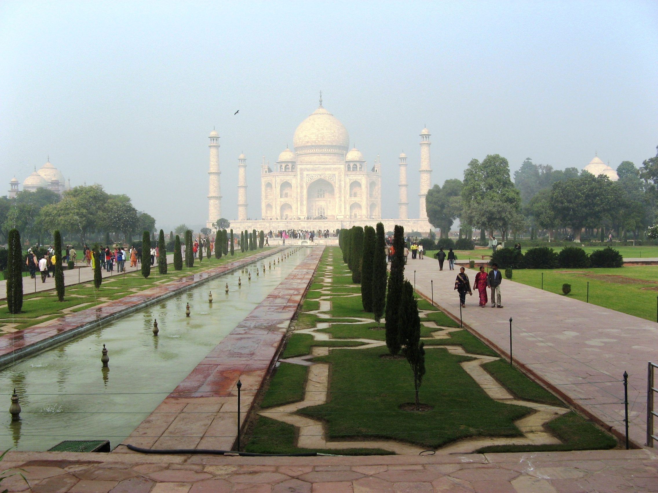 Taj mahal